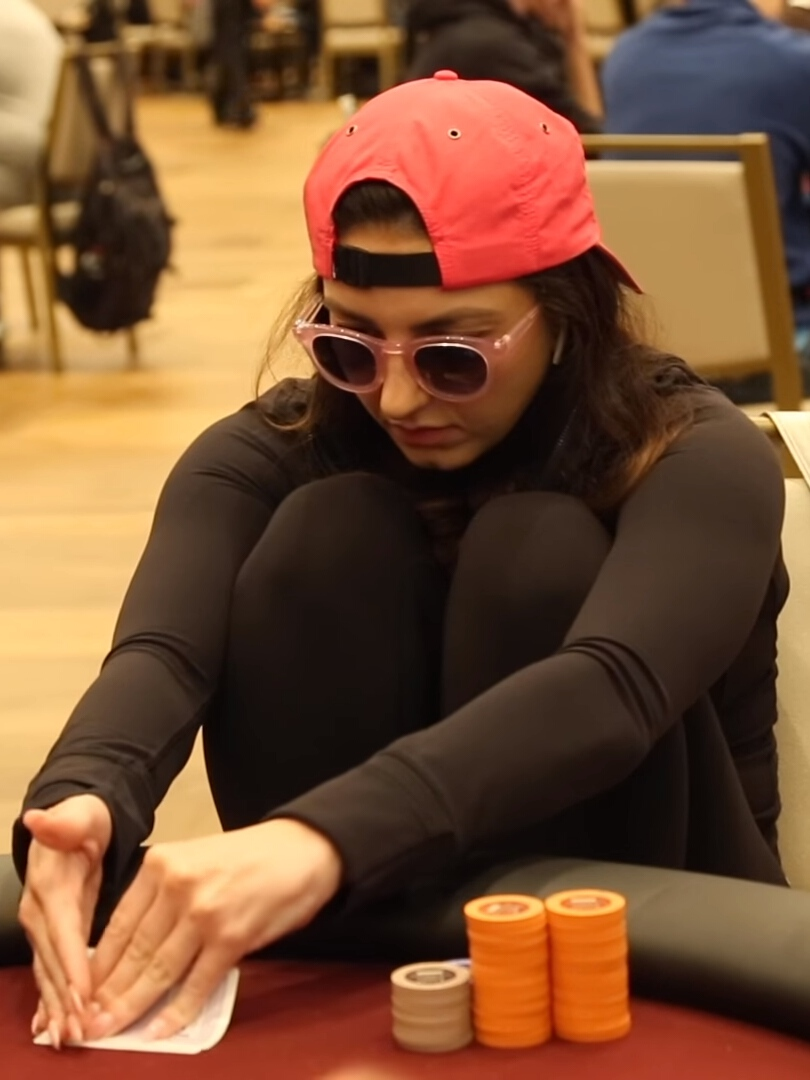 Kelly Minkin bei der WPT Maryland